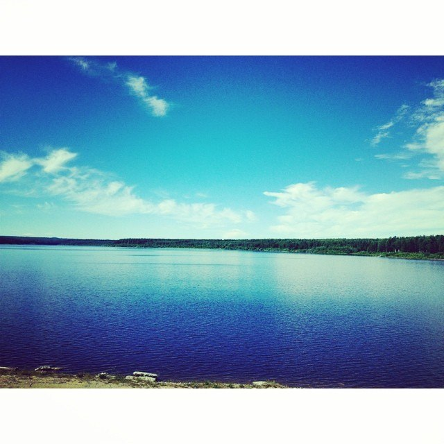 Озеро образованное дамбой на реке Каква в городе Серове.